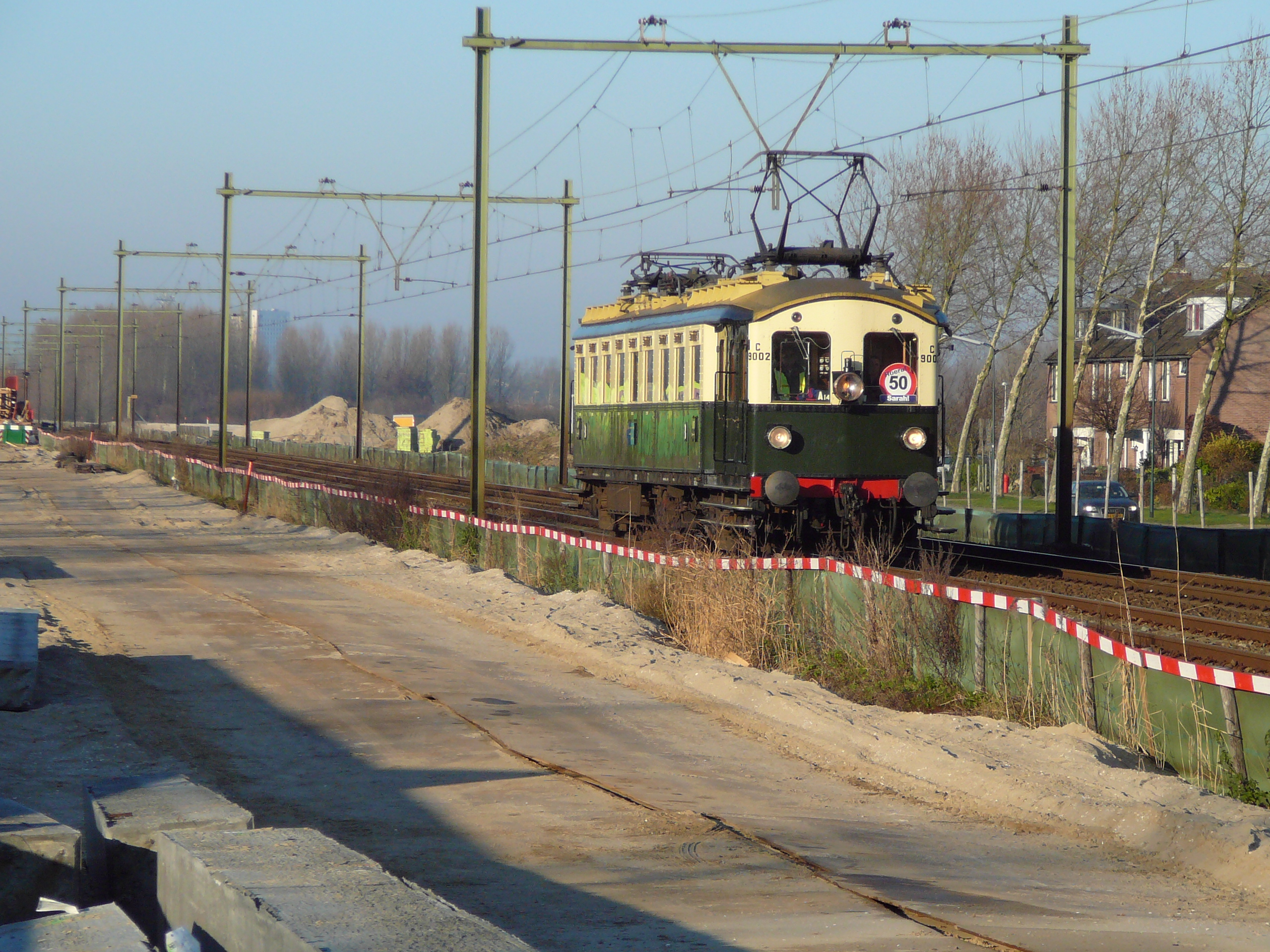 Jaap 9002 Haarlem - Heerlen, Houten